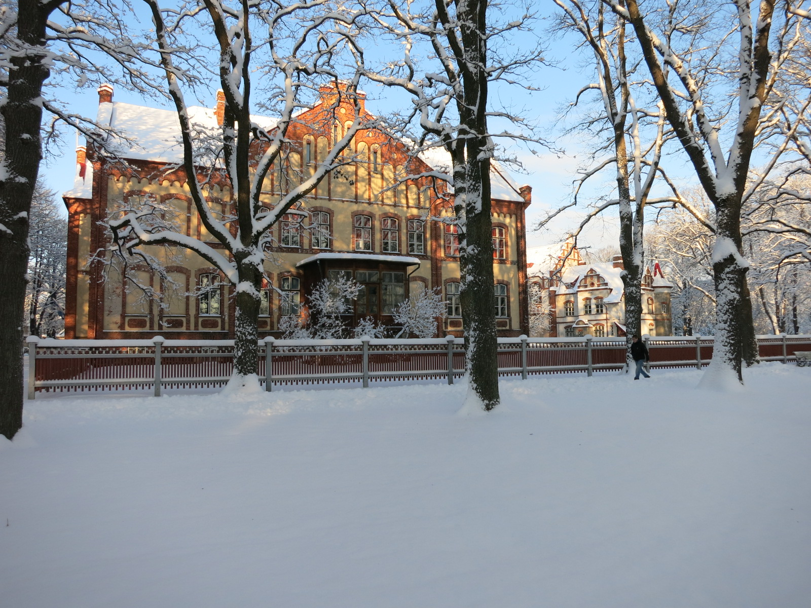 Pärnu Vanalinna Põhikool